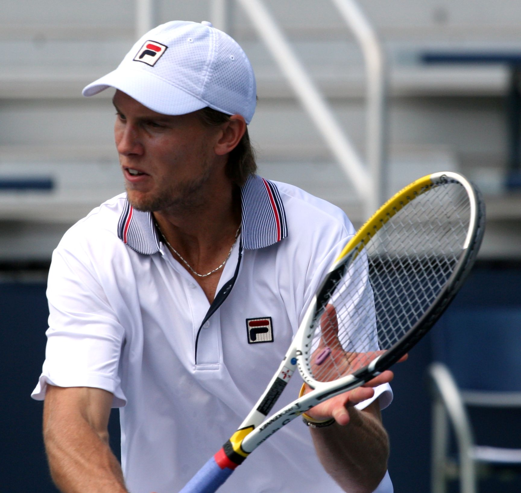 U.S. Open Saturday, Sept. 3, 2011